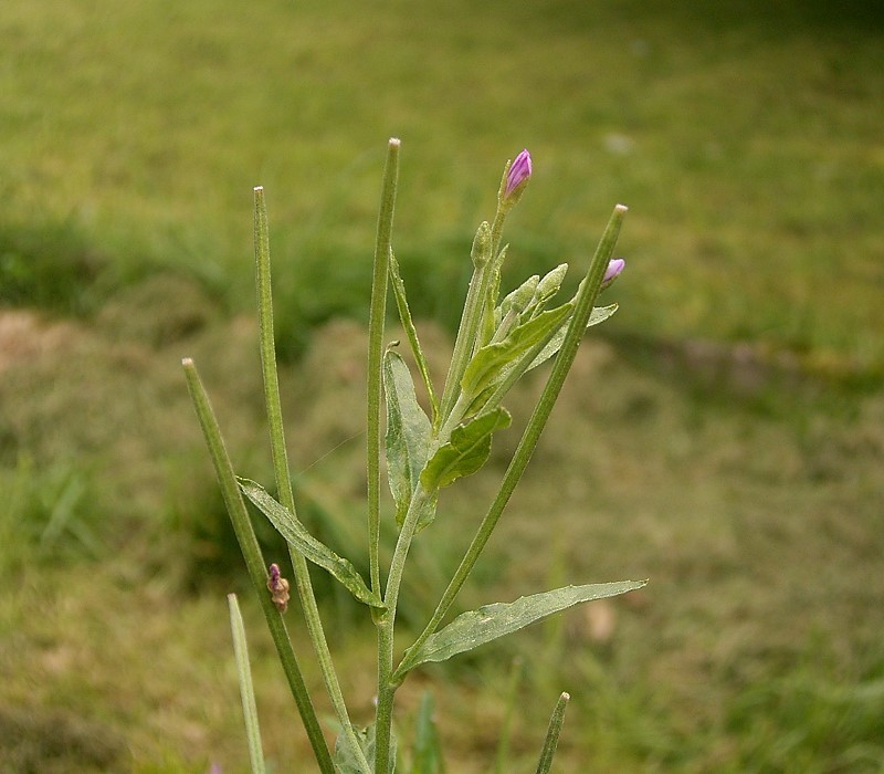 Epilobium montanum